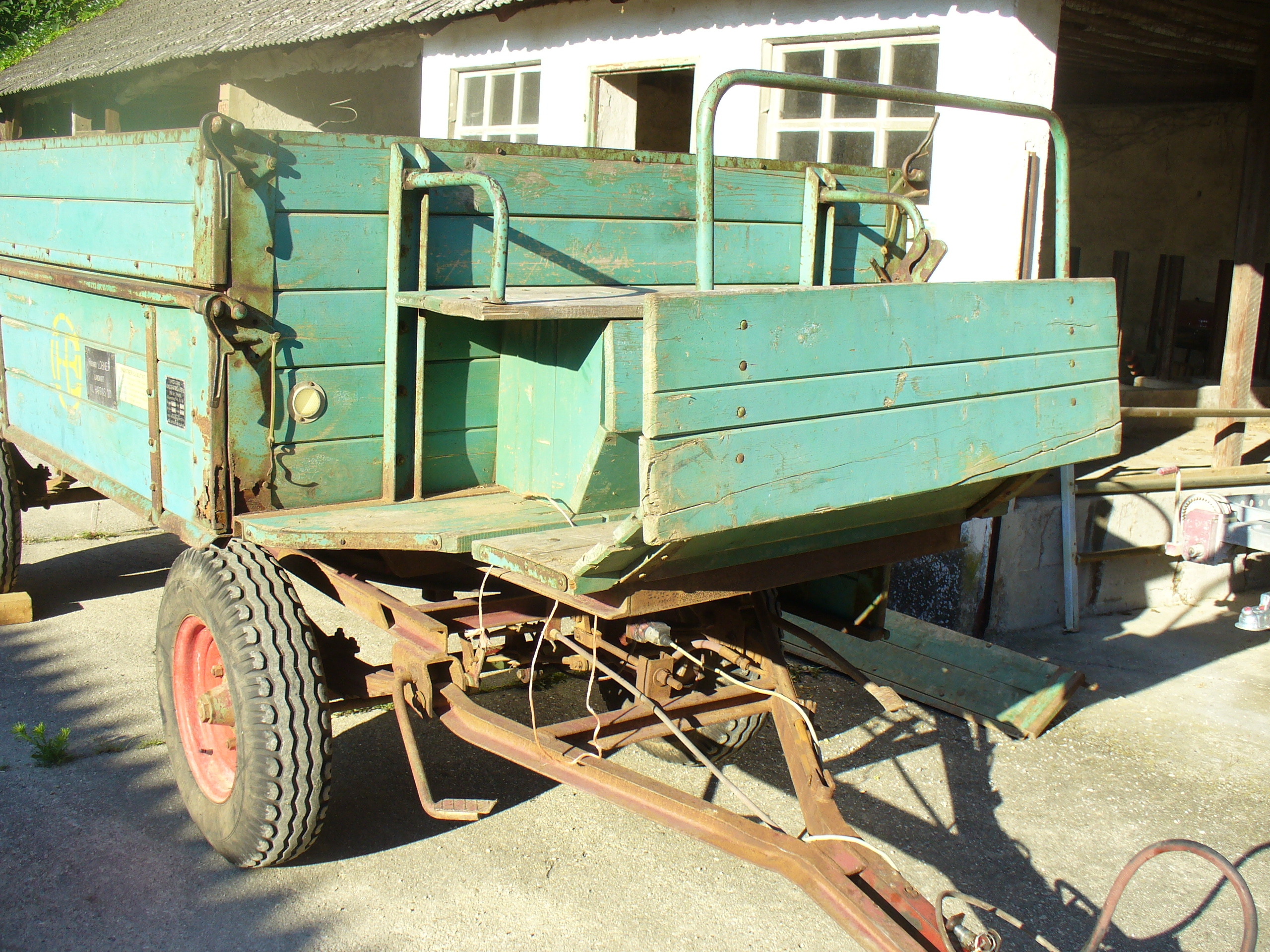 Zweiachsanhänger